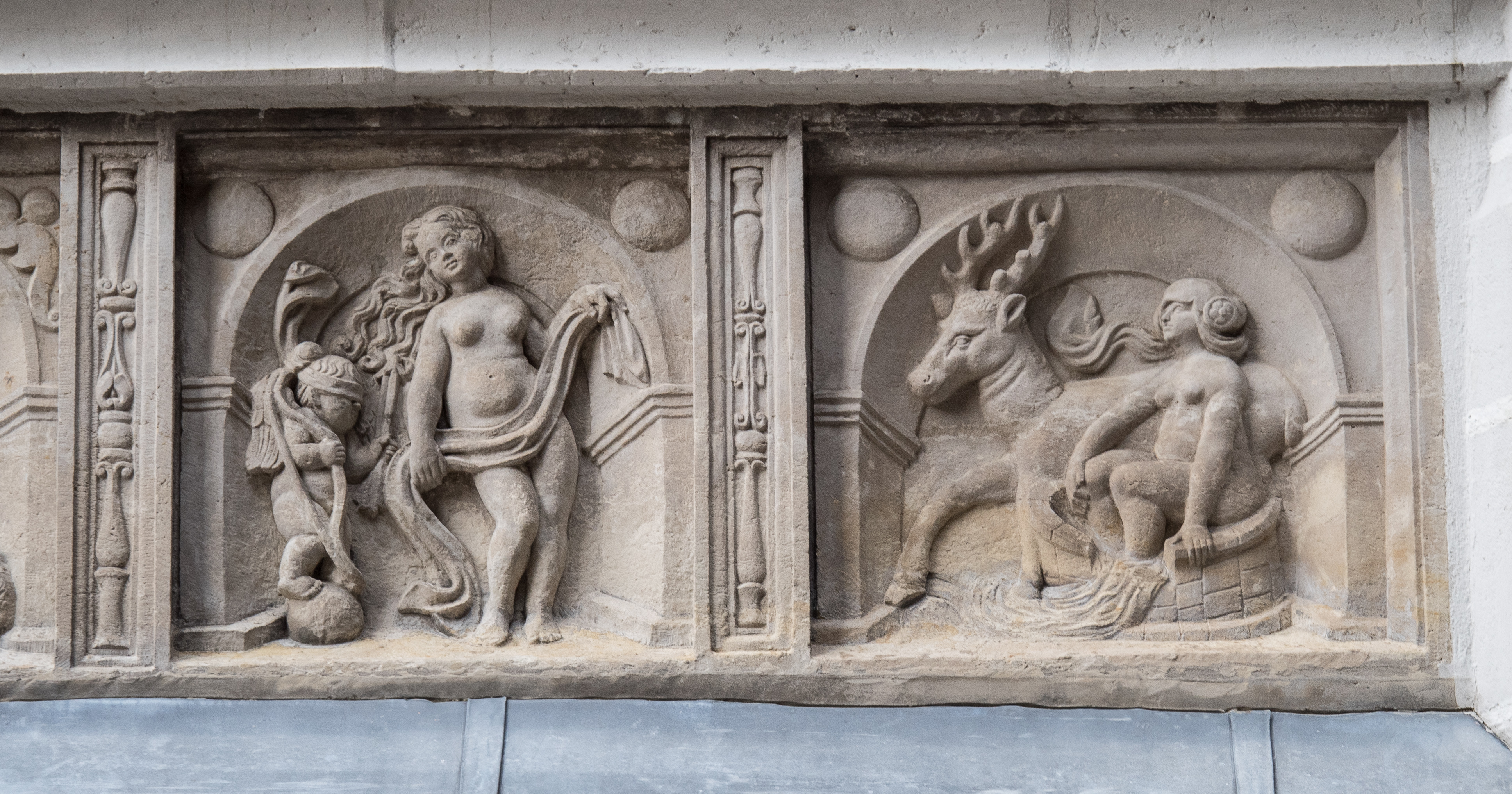 Antikisierende Reliefs am Großen Wendelstein der Albrechtsburg in Meißen, 1524 von dem Bildhauer Christoph Walther I ausgeführt